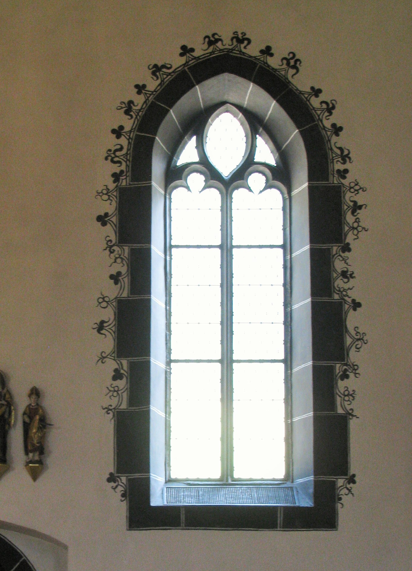 Pfarrkirche St. Georg, Ernen (Goms, Wallis, Schweiz), 1510-1518, Ulrich Ruffener, Saalkirche. Epoche: Spätgotik. Großes gotisches Fenster der südlichen Kirchenschiffwand.